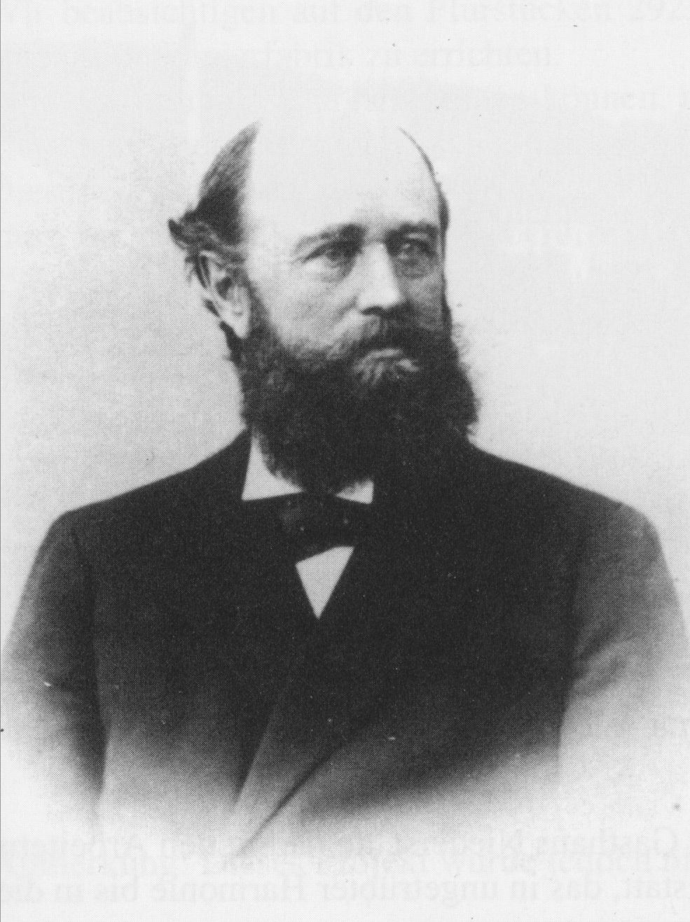 Gustav Rostosky (1839–1898), deutscher Papierfabrikant und Politiker